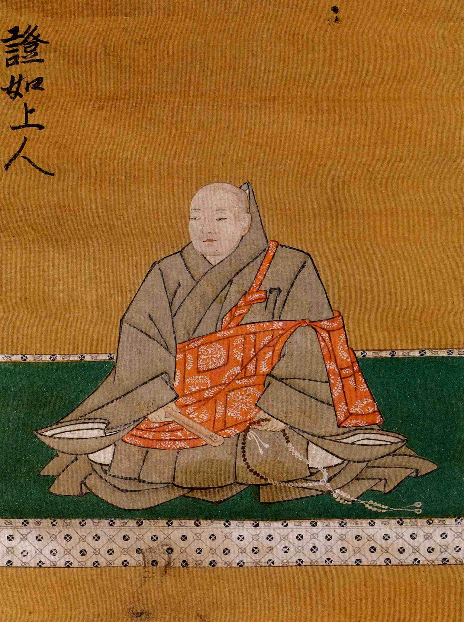 Image:Syounyo.jpgの拡大画像